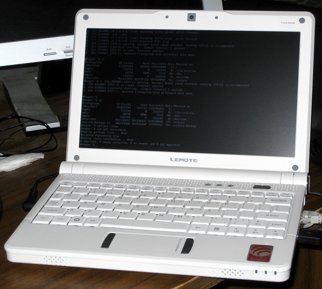 Lemote Yeeloong 8101B netbook